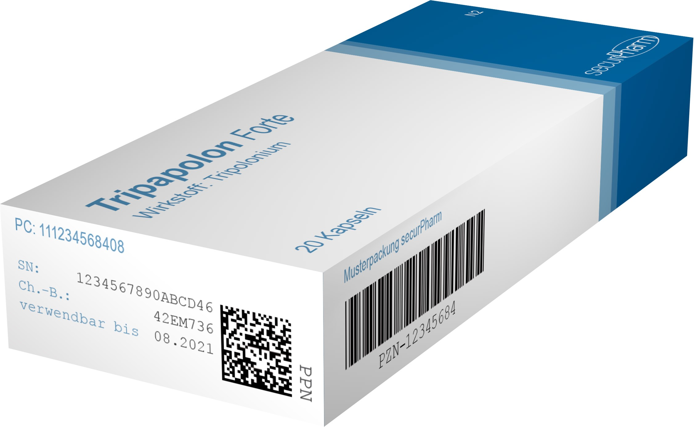 fiktives Arzneimittel gemäß Fälschungsschutzrichtlinie für Arzneimittel